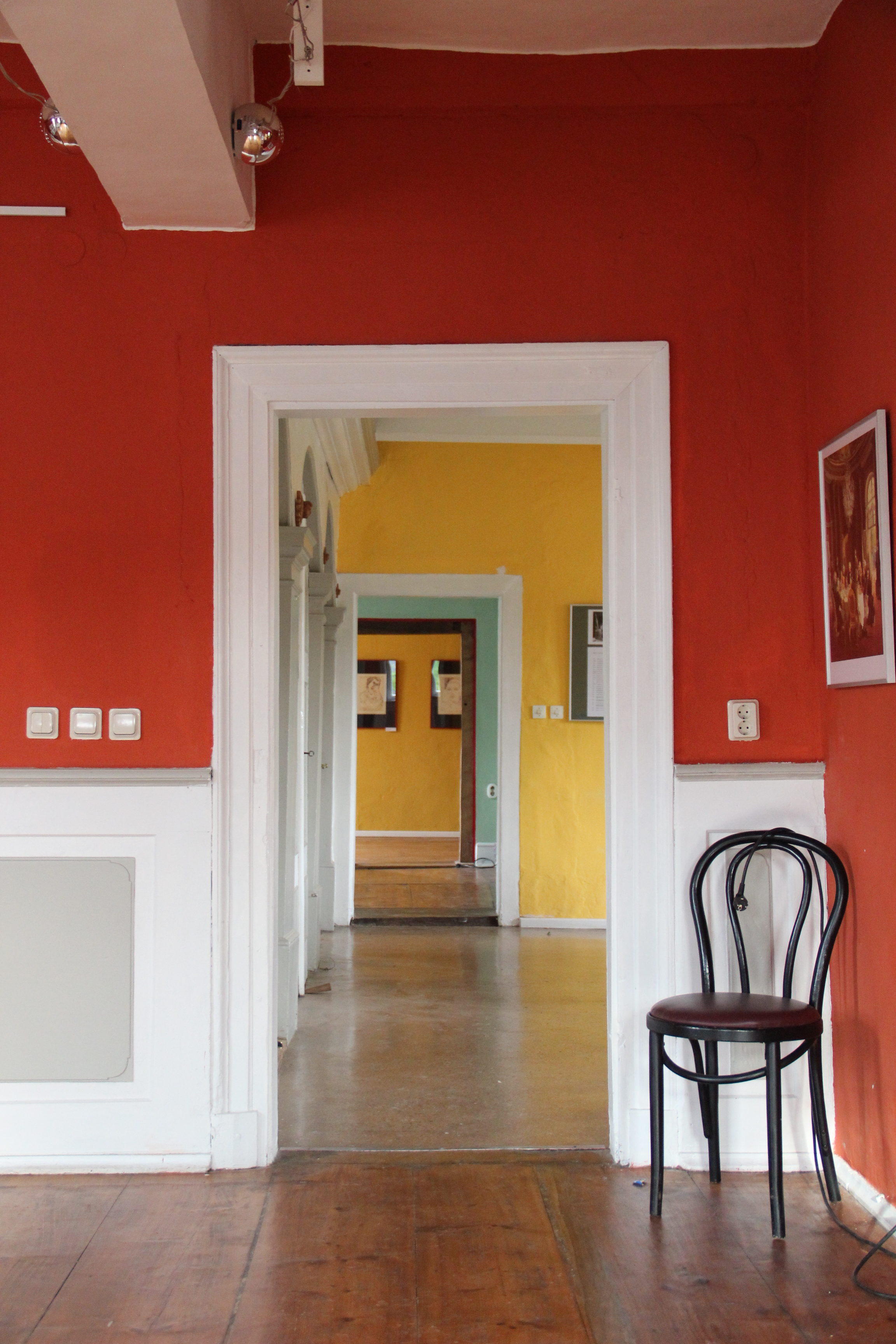 Galerieräume im 1. OG. für Ausstellungen und Veranstaltungen genutzt. Im Erhaltungszustand des 18. Jhd.s